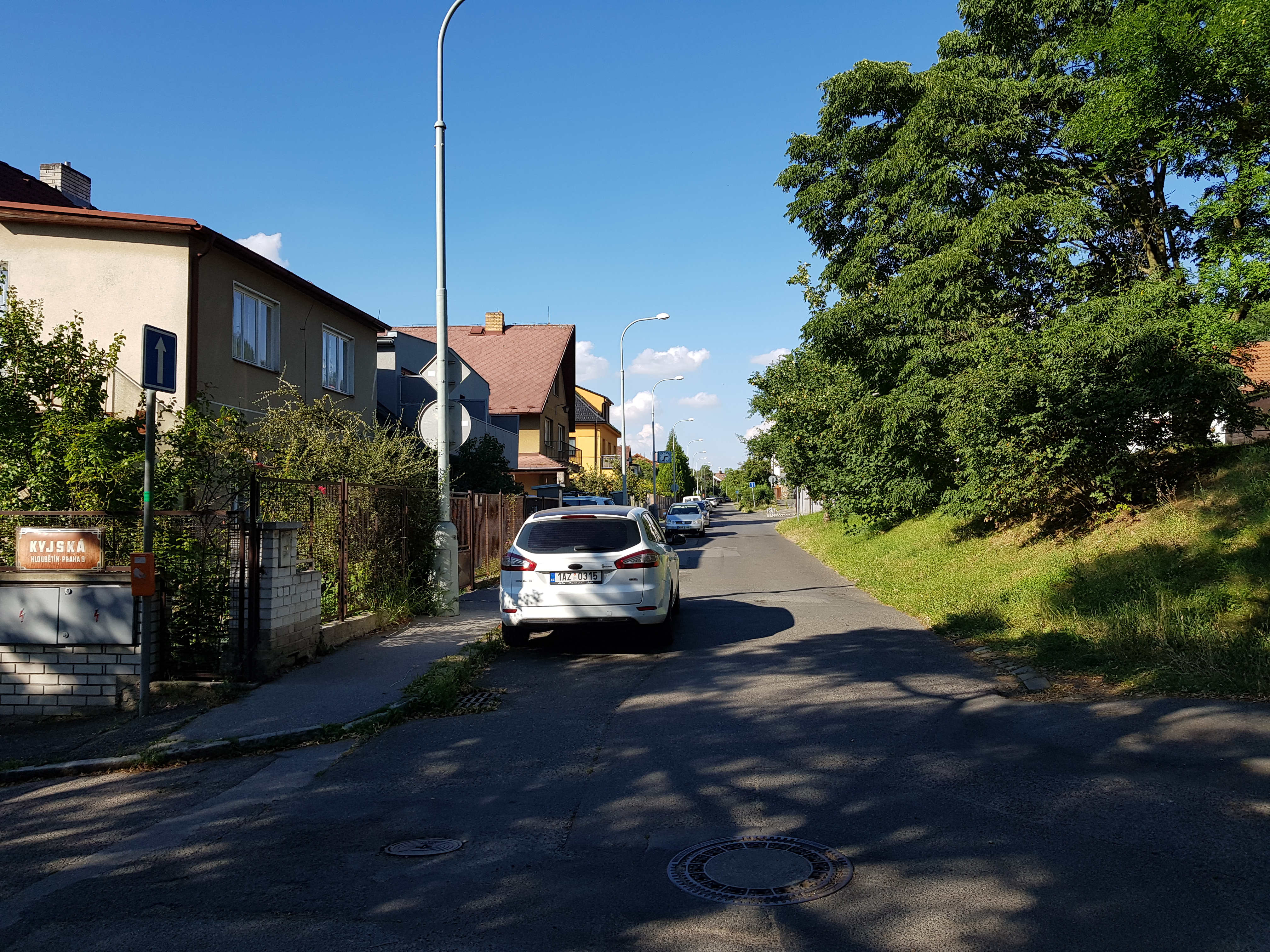 Ulice V Chaloupkách, Praha 14-Hloubětín, pohled od ulice Kyjská na východ